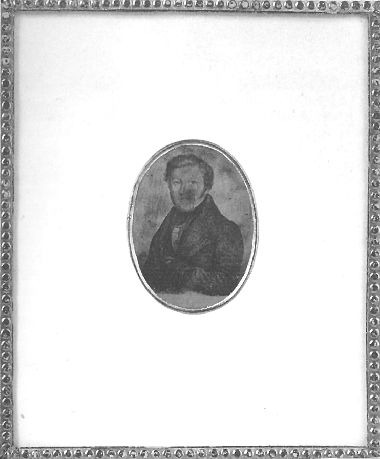 Porträt von Christian Friedrich (von) Schmid [Professor für evangelische Theologie der Universität Tübingen, † 1852] (Lithographie nach einer nicht mehr erhaltenen Daguerreotypie)